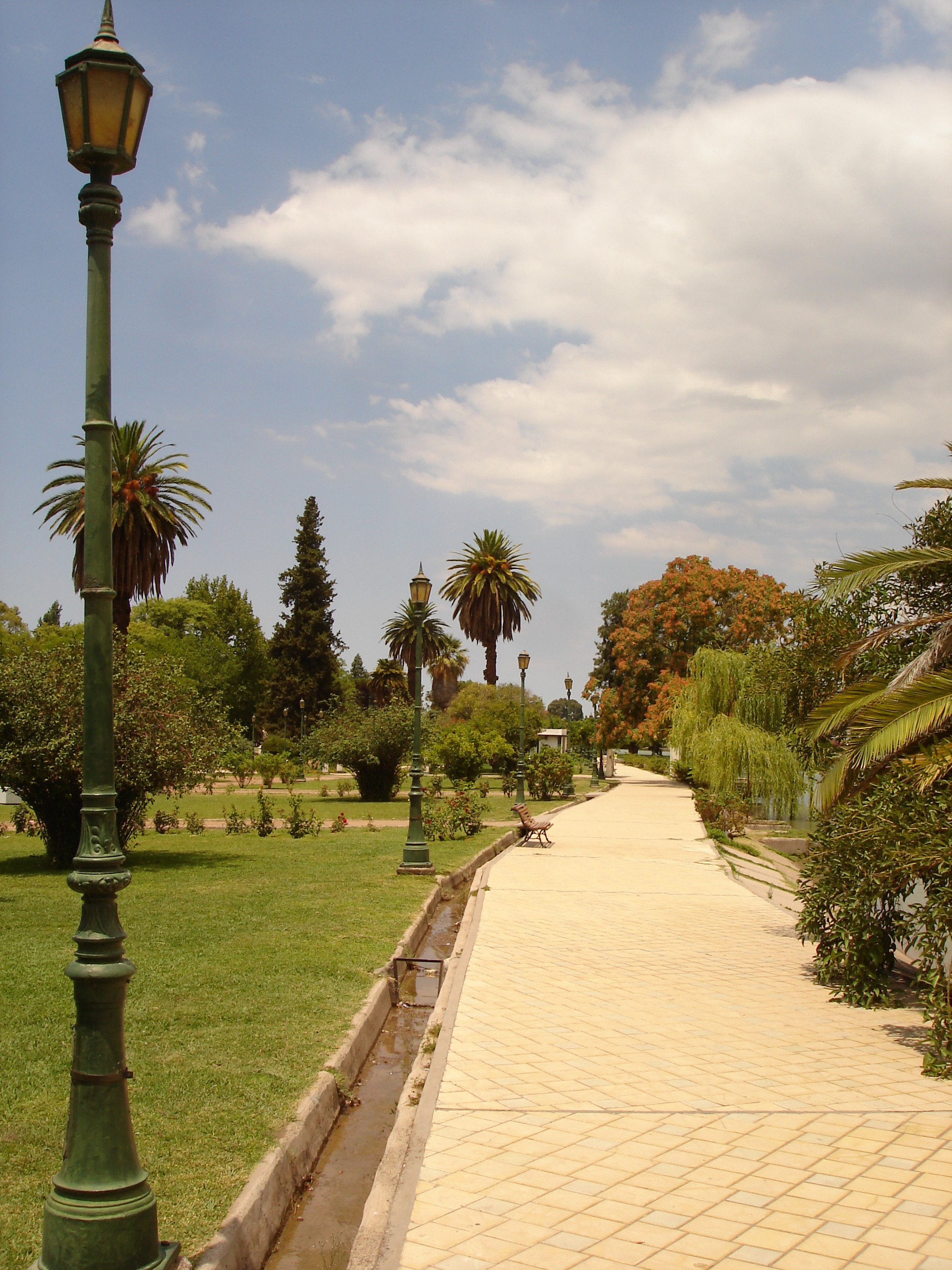 Rose garden, San Martín Park, Mendoza, Argentina.